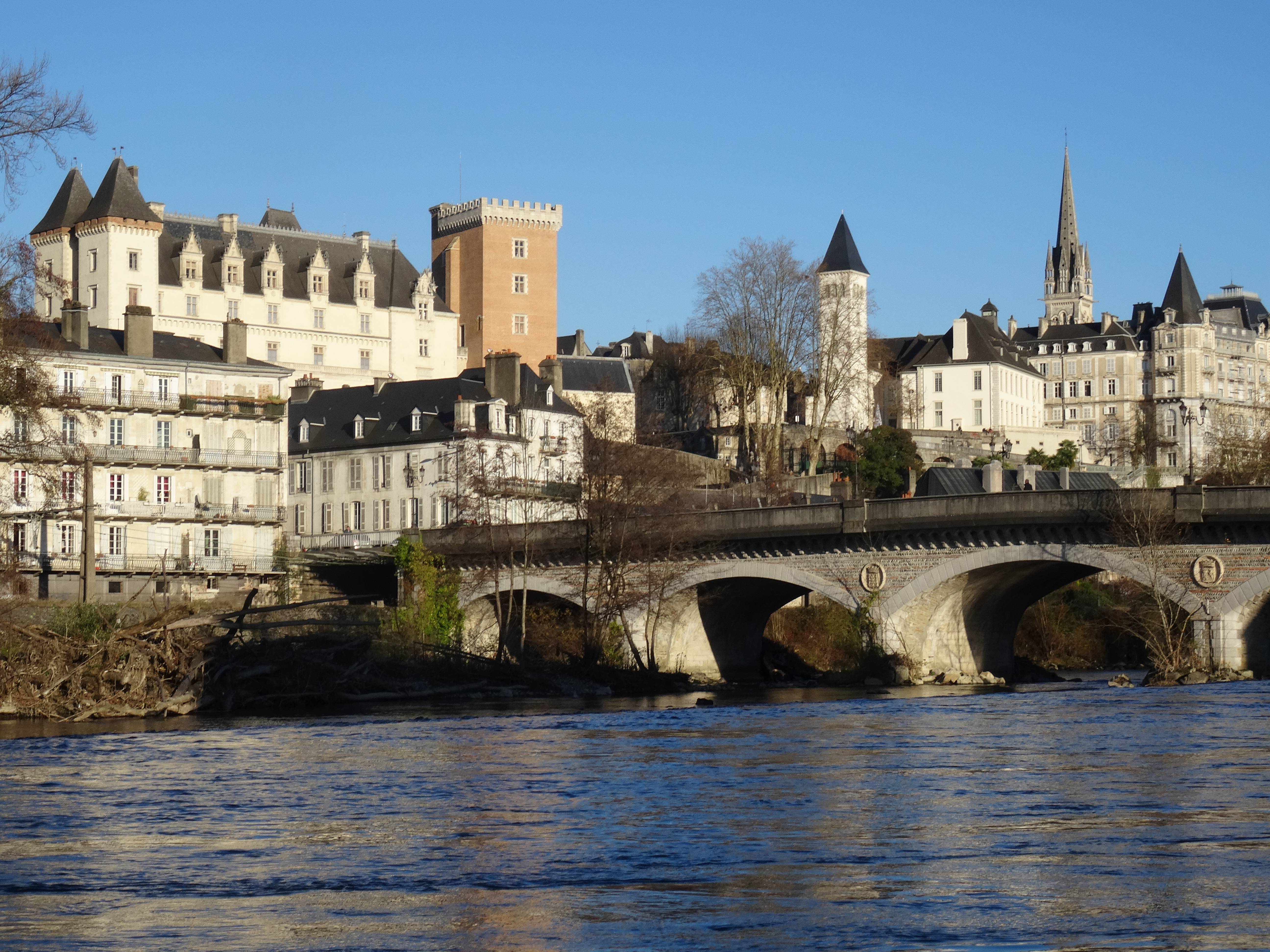 Vue sur Pau depuis le Gave